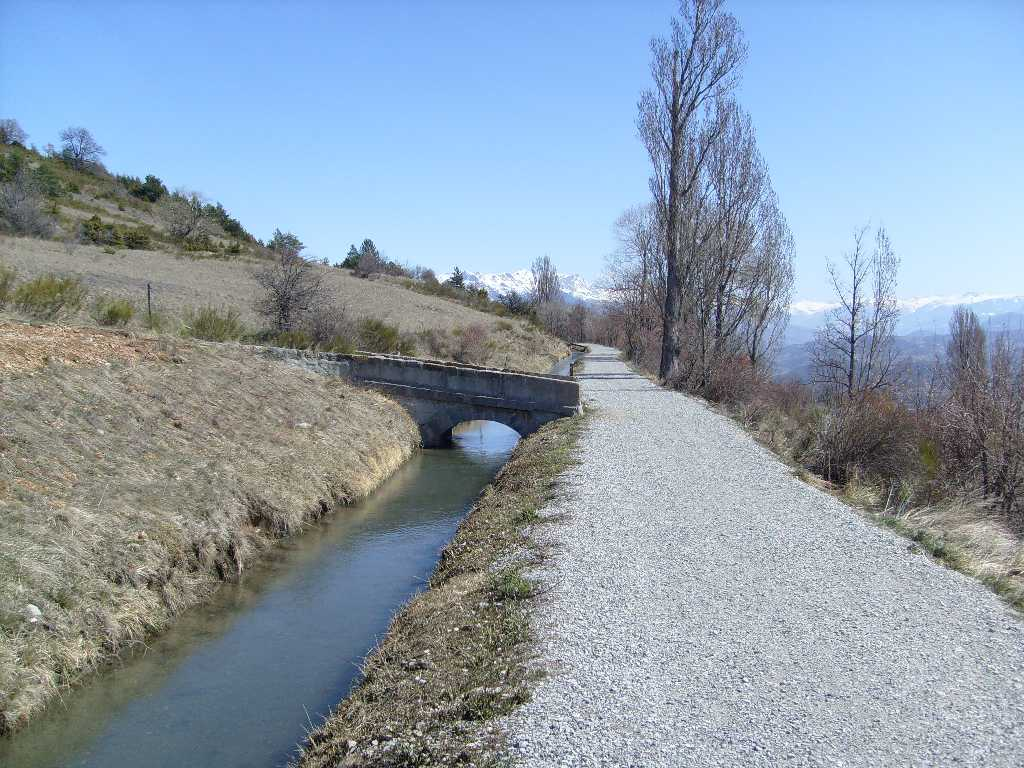 Canal du Drac au dessus de Gap( Hautes-Alpes)